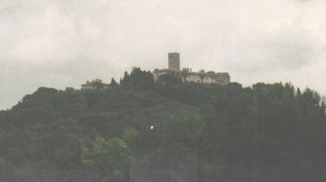 descrizione: veduta della Fattoria di Marsiliana lavoro personale di Vinattieri Matteo che lascia in pubblico dominio il 01/02/2007; foto scattata da apparecchio non digitale nel settembre 2005 e rielaborata successivamente